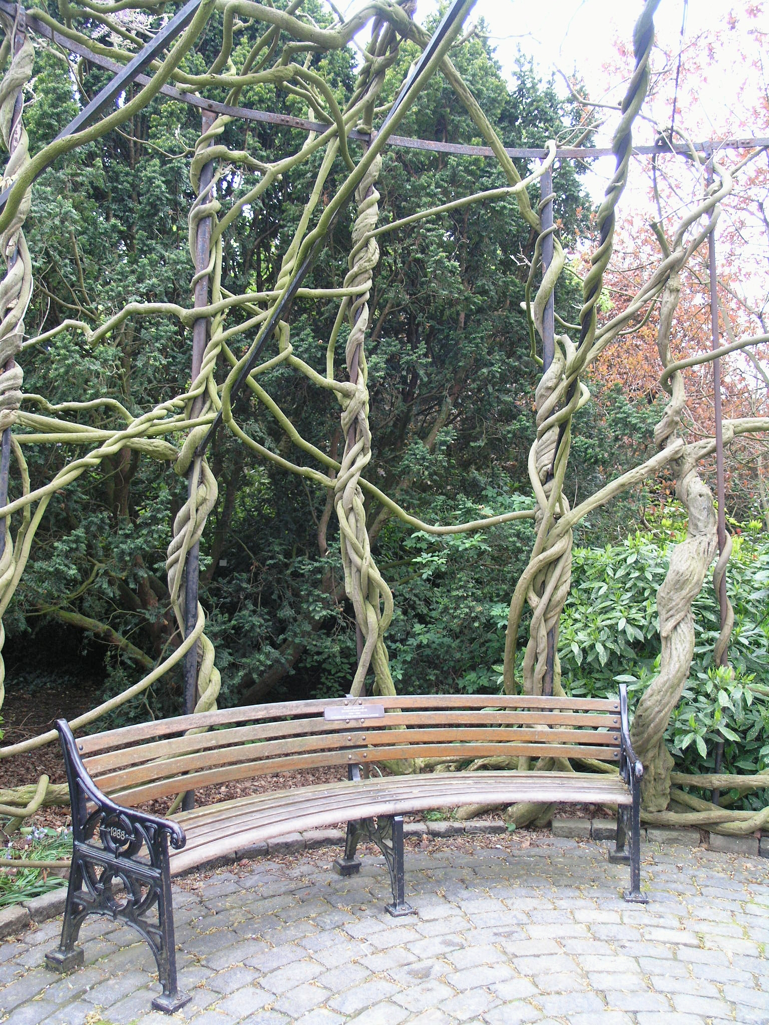 Kew Gardens, London